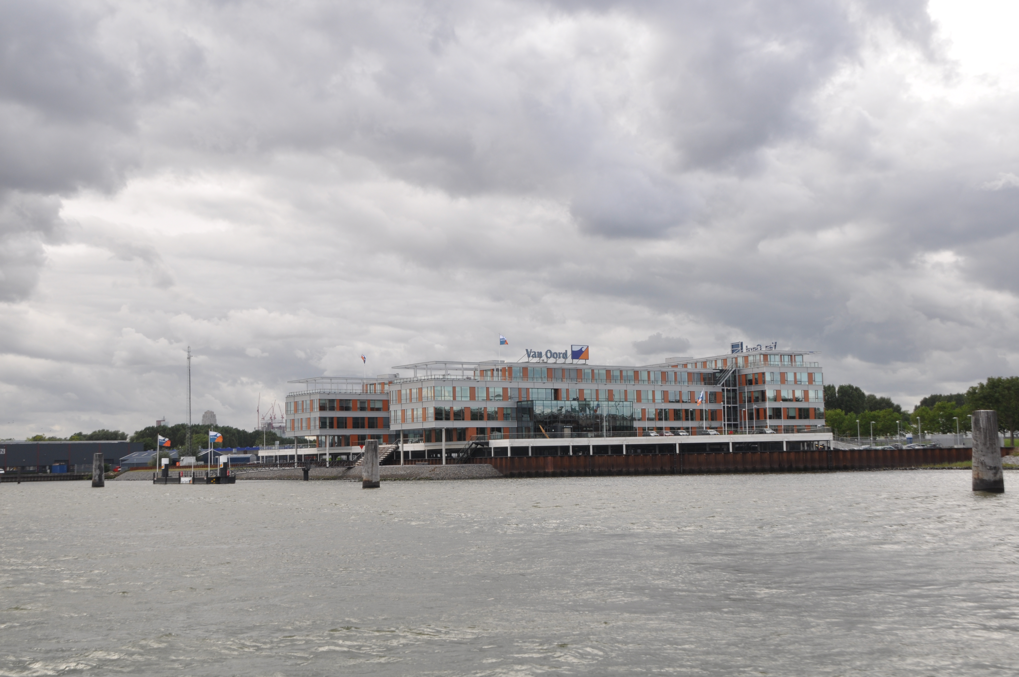 Het kantoor van Van Oord aan de rechter Maasoever van de Nieuwe Maas.